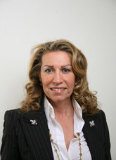 Foto della deputata Melania Rizzoli